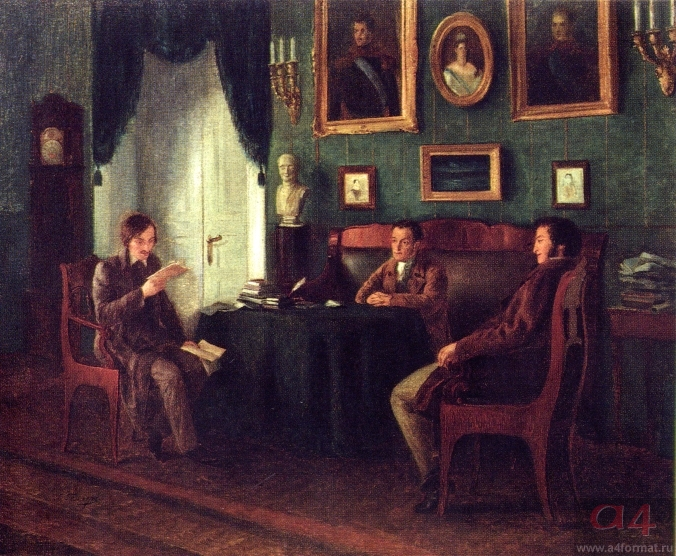 Гоголь и Жуковский у Пушкина в Царском Селе. Художник П. Геллер. 1910